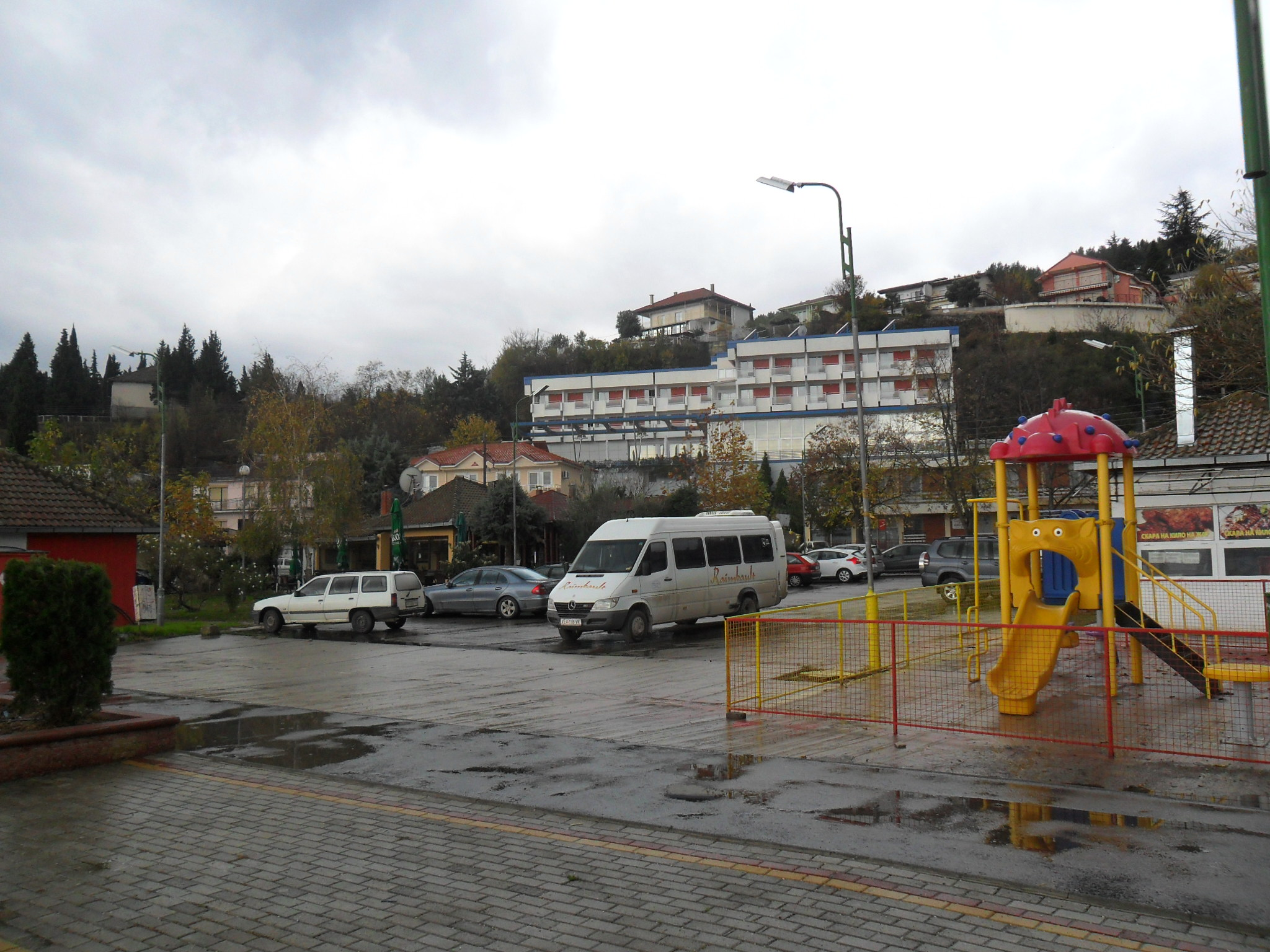 View of Old Dojran